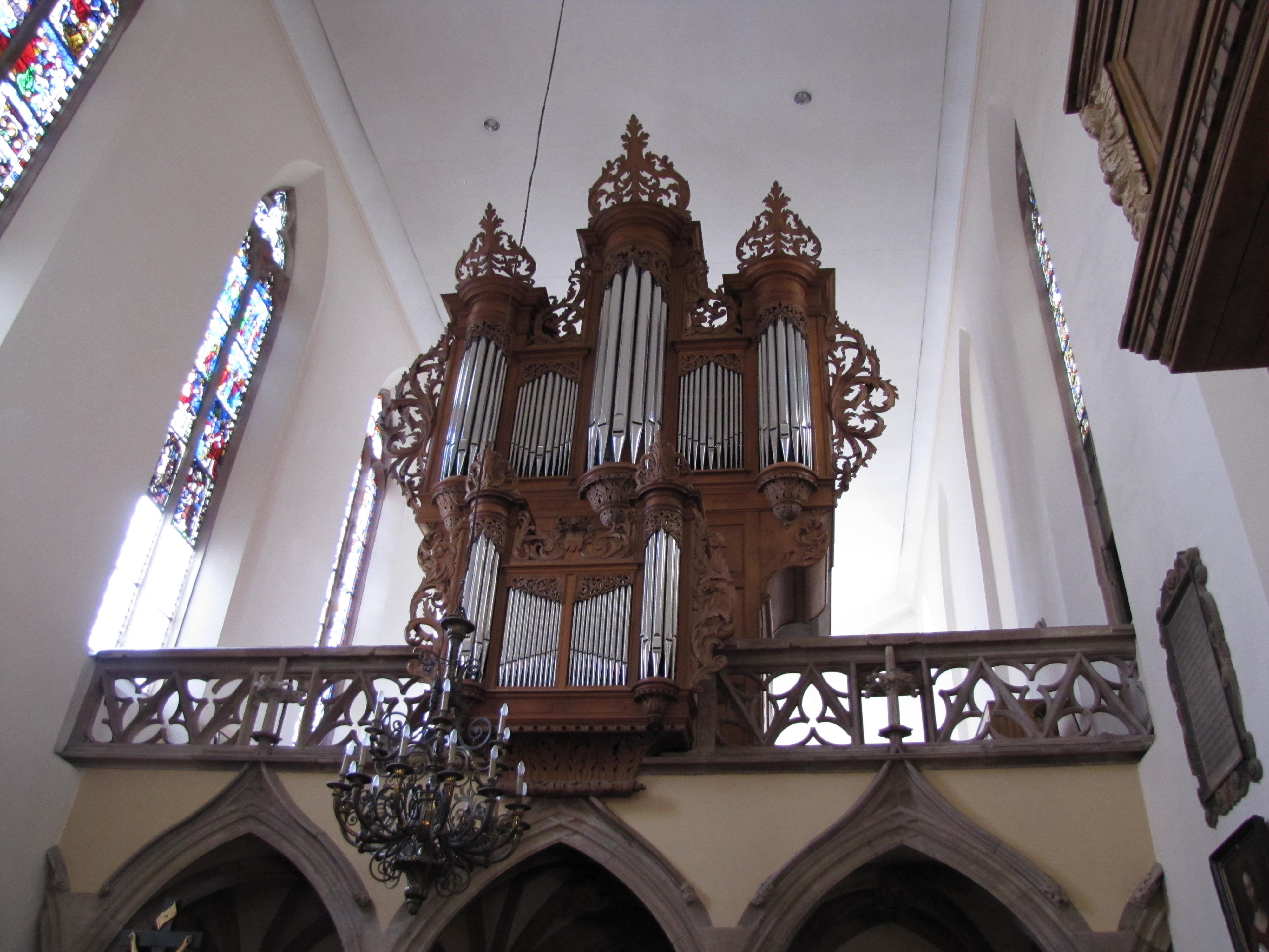 Alsace, Bas-Rhin, Église protestante Saint-Guillaume de Strasbourg (PA00085026). Orgue André Silbermann (1728): This object is classé Monument Historique in the base Palissy, database of the French furniture patrimony of the French ministry of culture, under the references PM67000973 and buffet PM67000404 buffet.